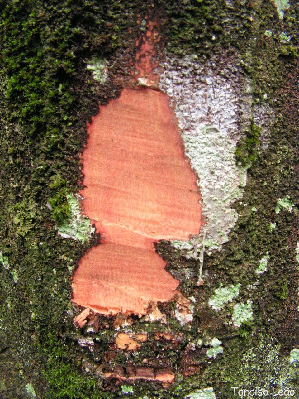 Possui resina com odor agradável